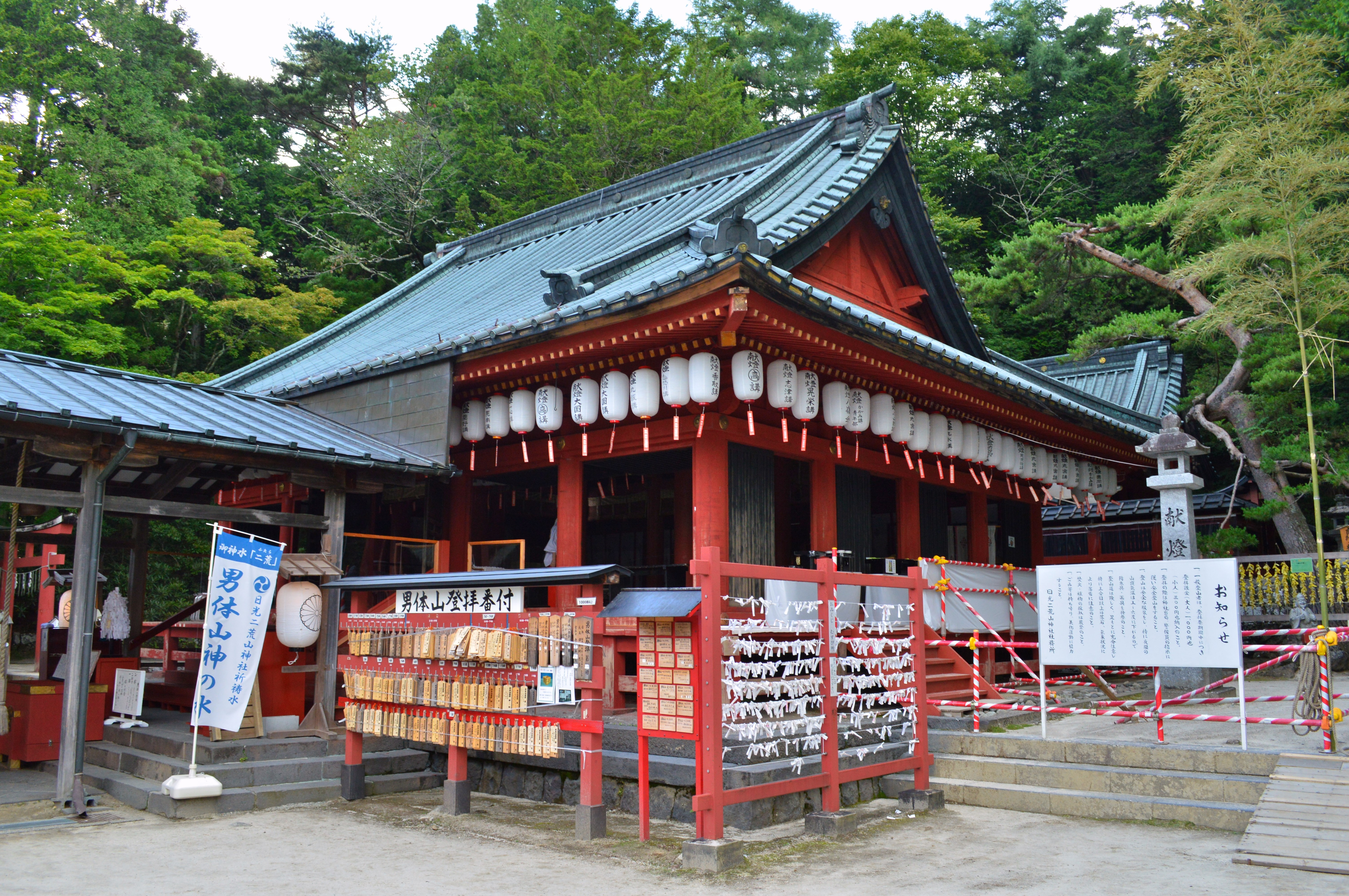 日光二荒山神社 中宮祠 拝殿